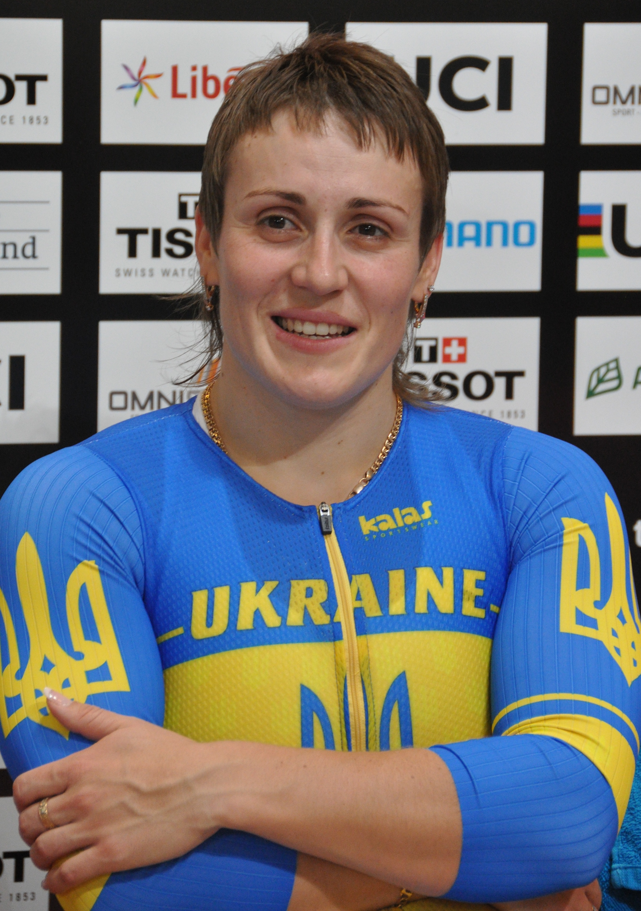 Ljubow Bassowa, ukrainische Radsportlerin